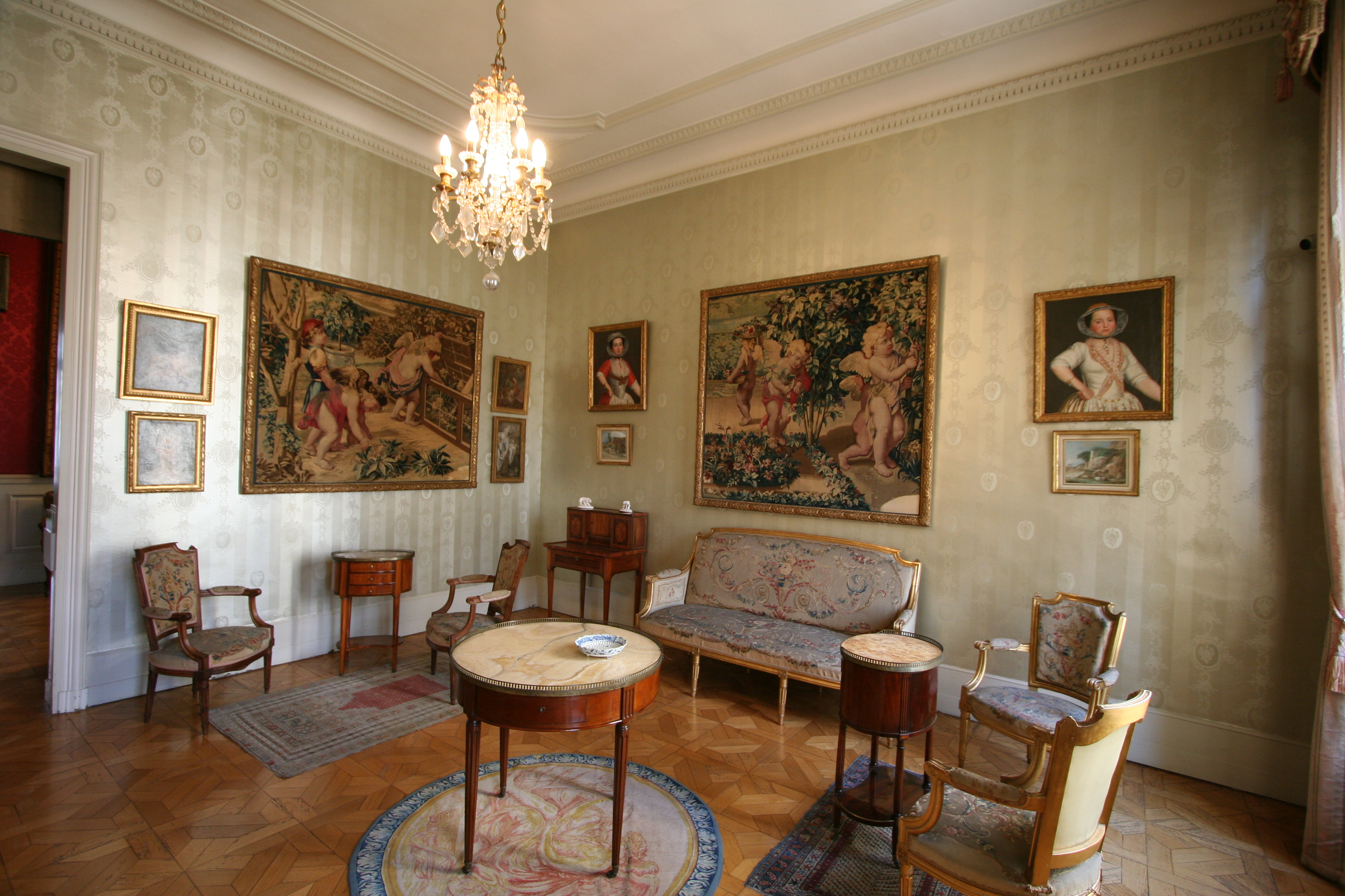 Salon Louis XVI au Musée Grobet-Labadié à Marseille.